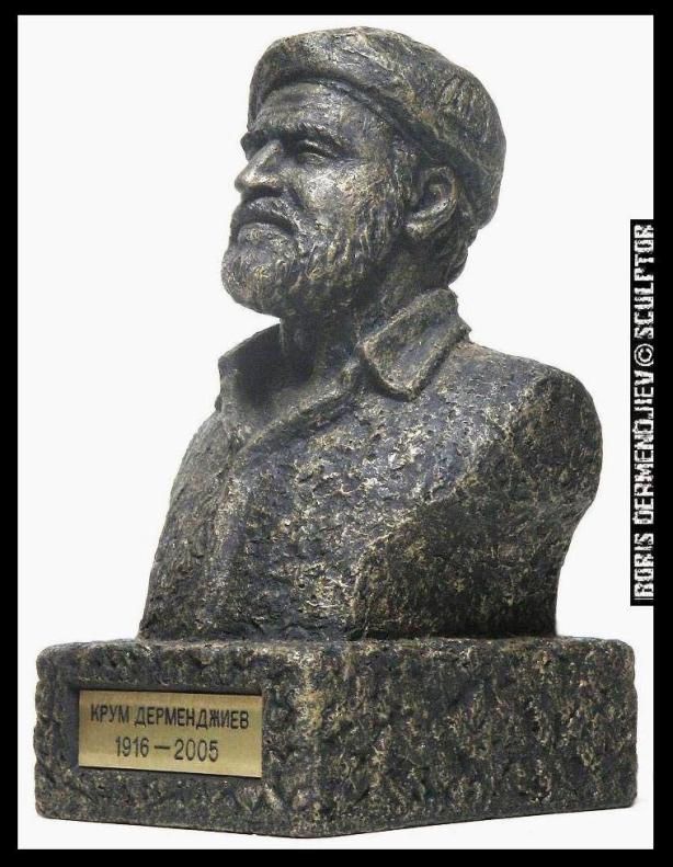 Портрет на Крум Дерменджиев от Борис Дерменджиев - син. 2011 г.